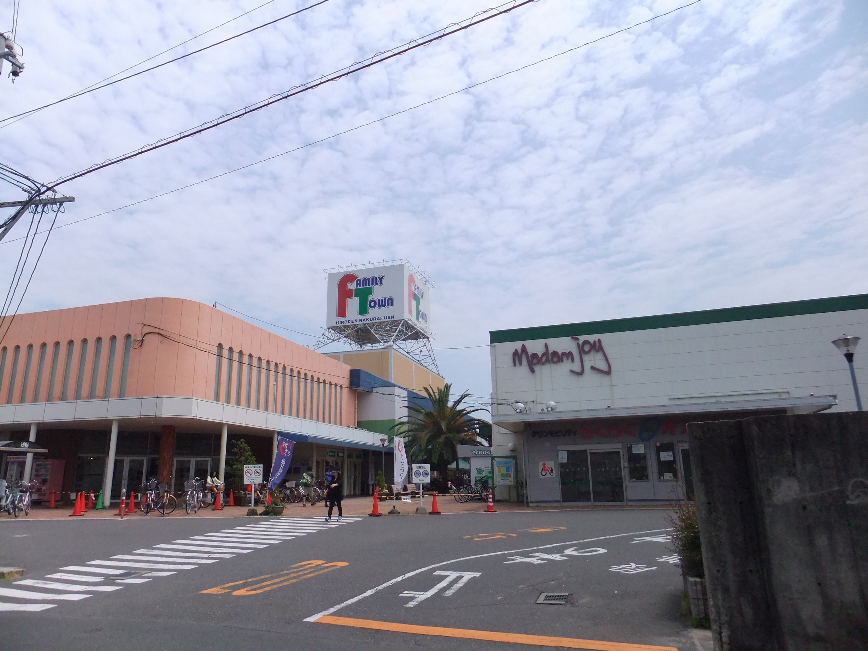 ファミリータウン広電楽々園